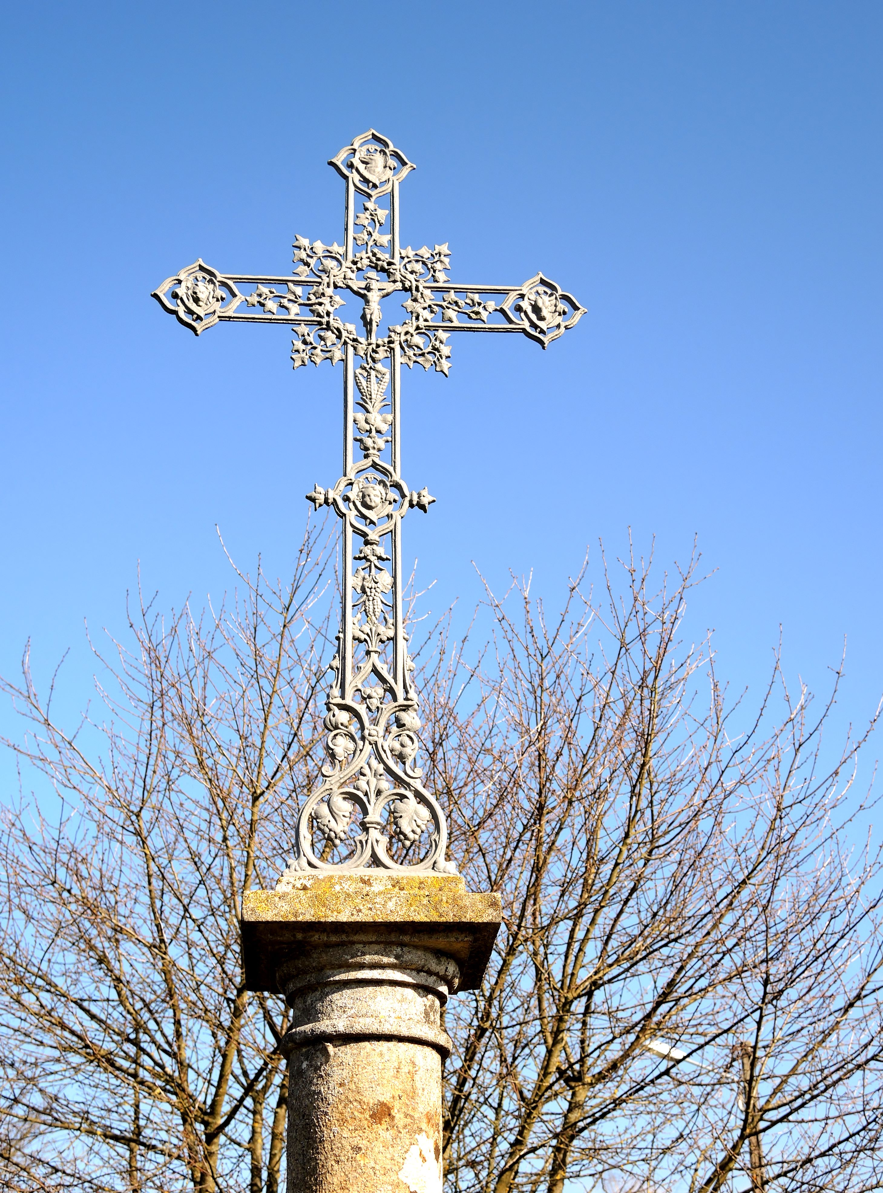 Détails de la croix datée de 1863, rue du calvaire à Bucey-lès-Traves.